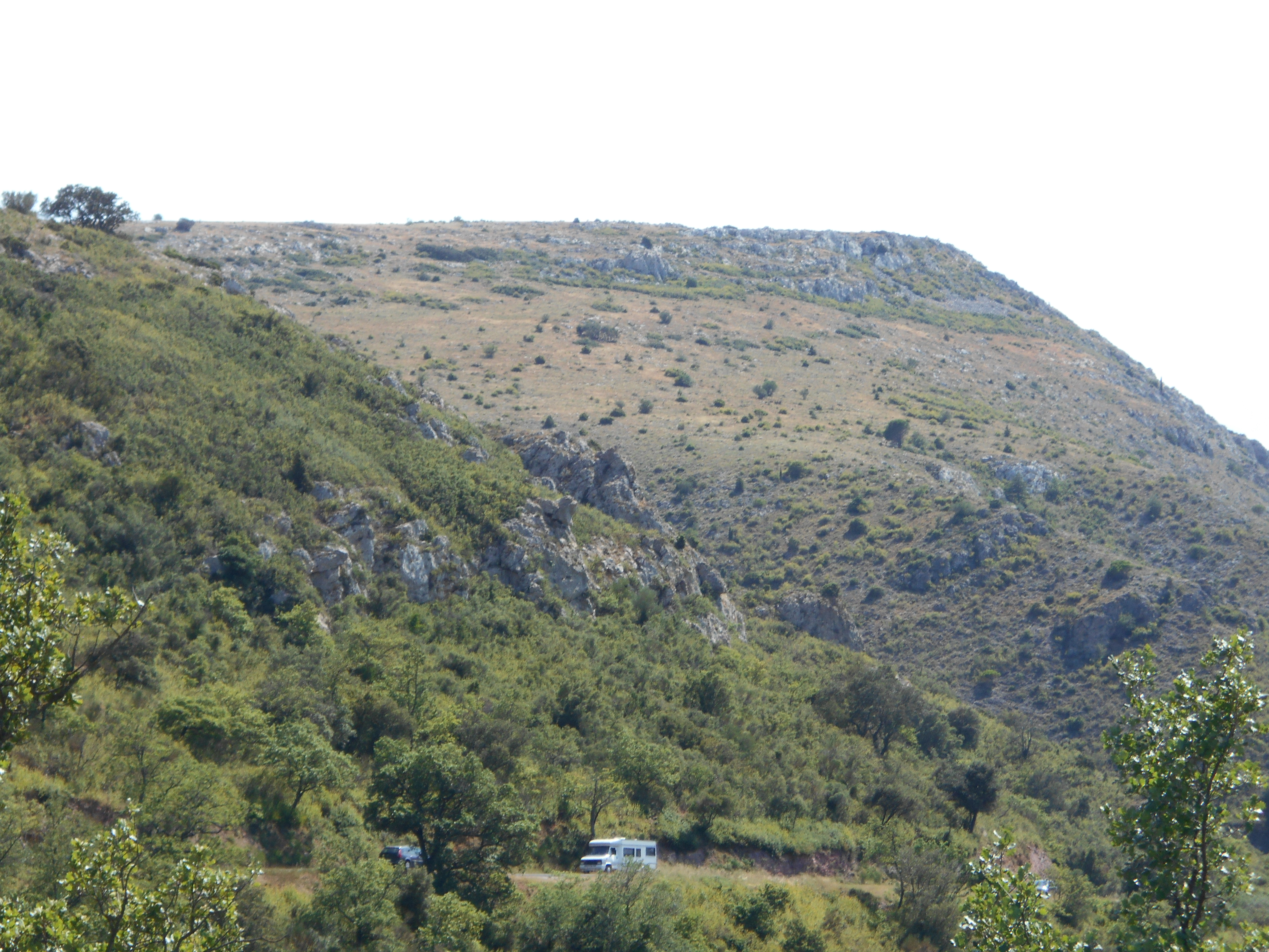 El Roc de Mallorca